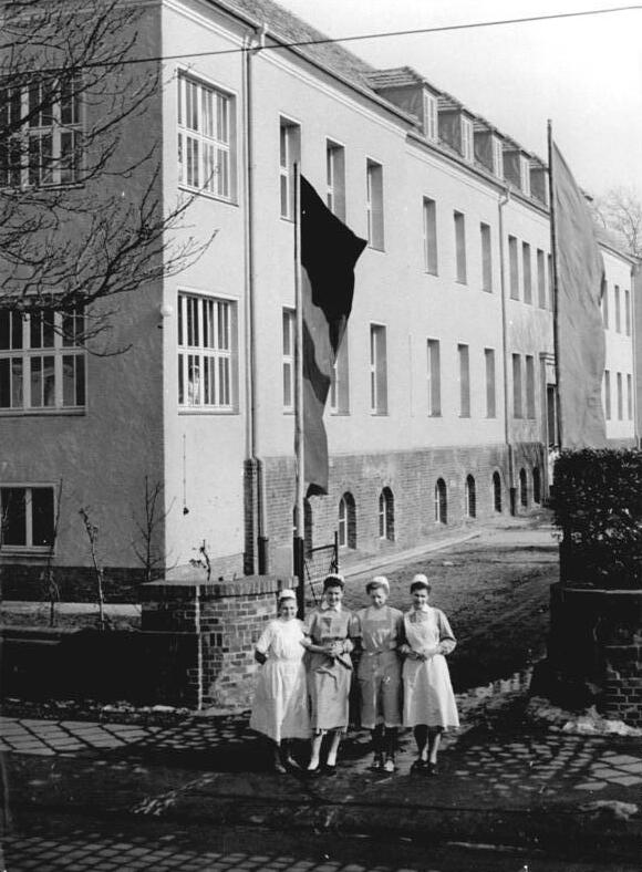 Cottbus, Säuglingsheim Zentralbild Schutt 8 Motive 18.3.1955 Das größte Säuglingsheim der DDR in Cottbus eröffnet Das bisher grösste Säuglingsheimen der Republik, ein Geschenk der Regierung, wurde am 8.3.1955, dem Internationalen Frauentag, den werktätigen Müttern von Cottbus übergeben. 100 Kleinstkinder bis zu drei Jahren und jeweils 15 Frühgeburten werden von geschulten Pflegerinnen, die unter der Oberaufsicht des Chefarztes der Cottbuser Kinderklinik stehen, fürsorglich betreut. UBz: Das Gebäude und der Eingang zum Säuglingsheim in Cottbus.